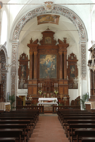 Altare ligneo Chiesa di San Antonino di Padova